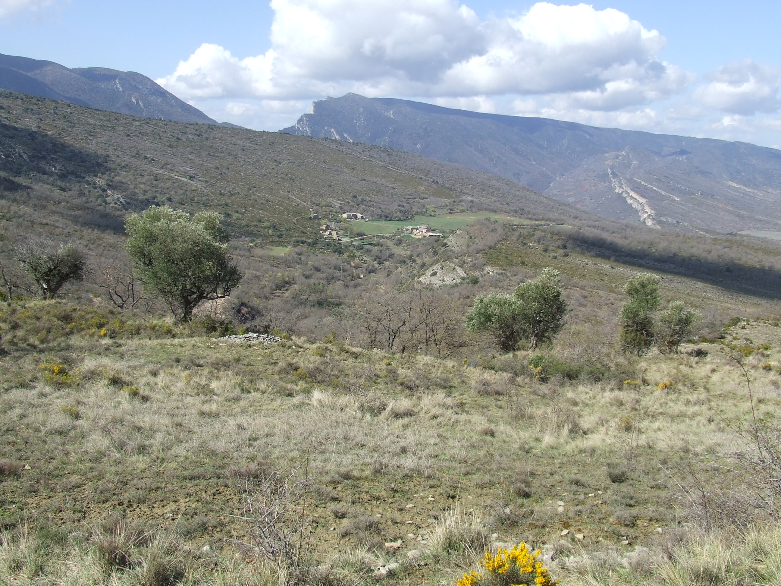 La vall del barranc de la Clua, amb el poble d'aquest nom (Sant Esteve de la Sarga, Pallars Jussà)